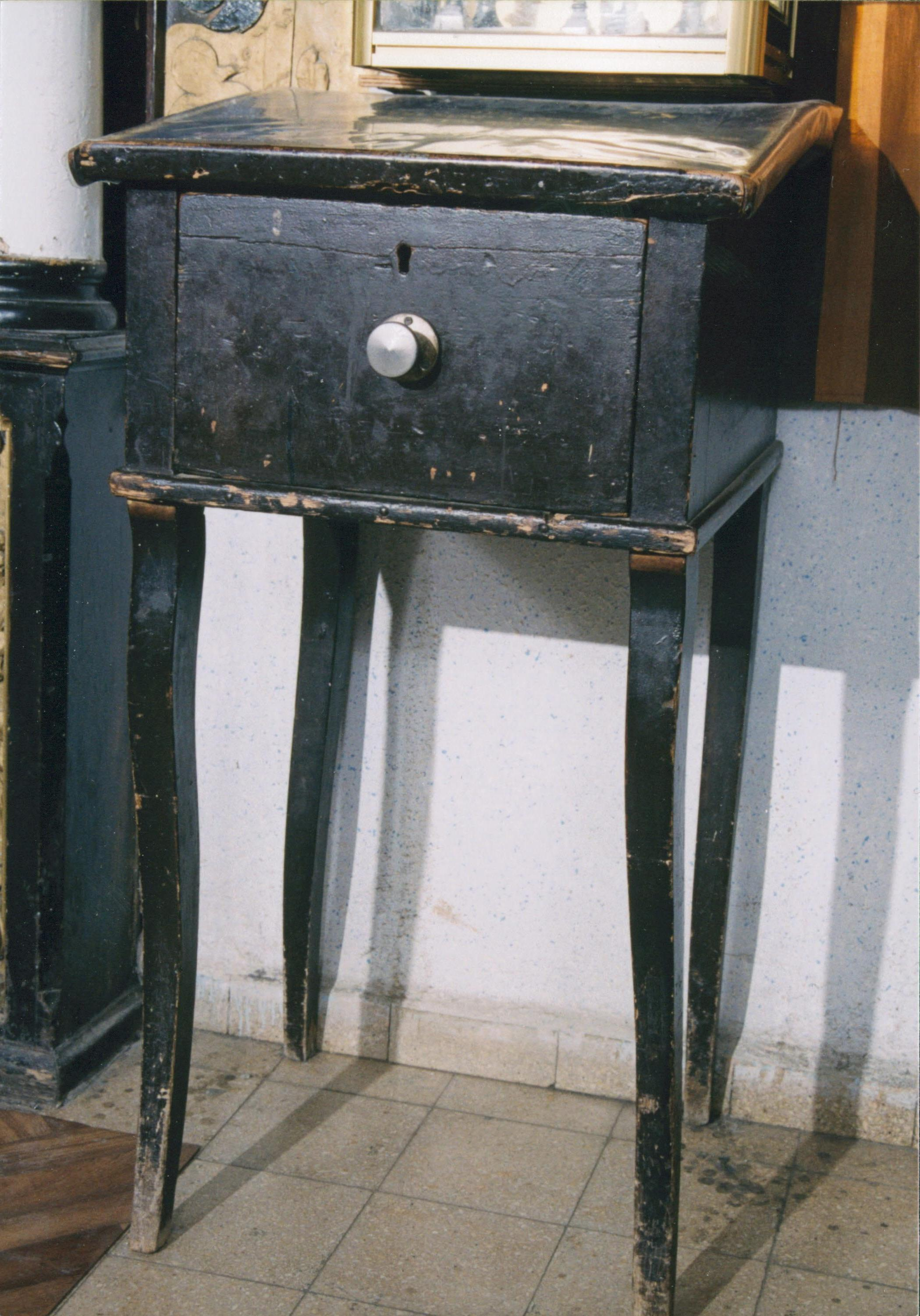 עמוד התפילה ששלח רבי אהרון מקרלין לטבריה